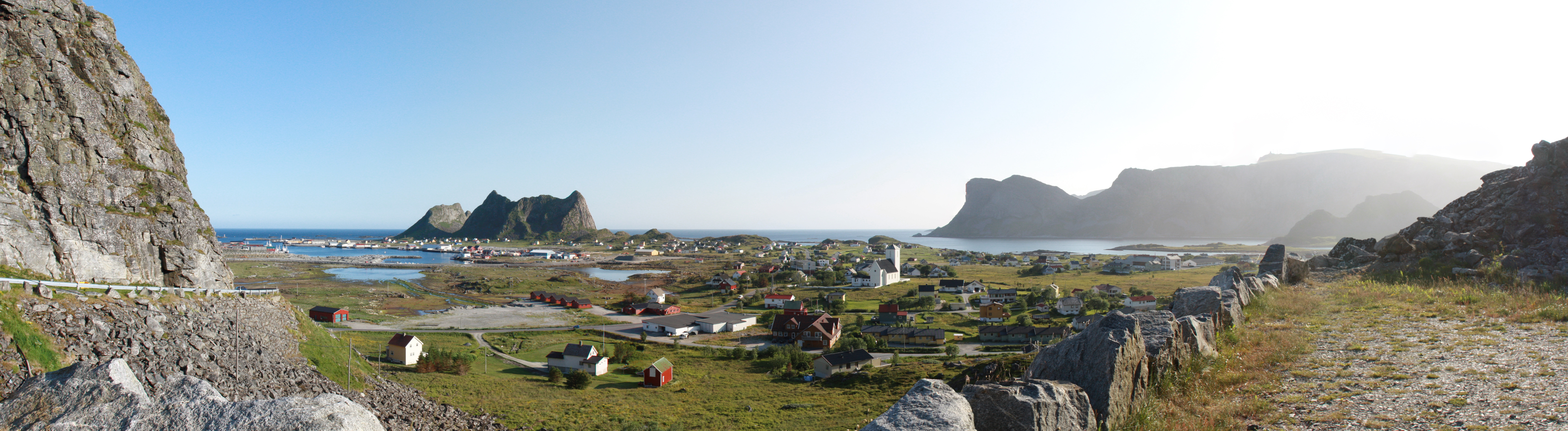 Panorama av Værøy